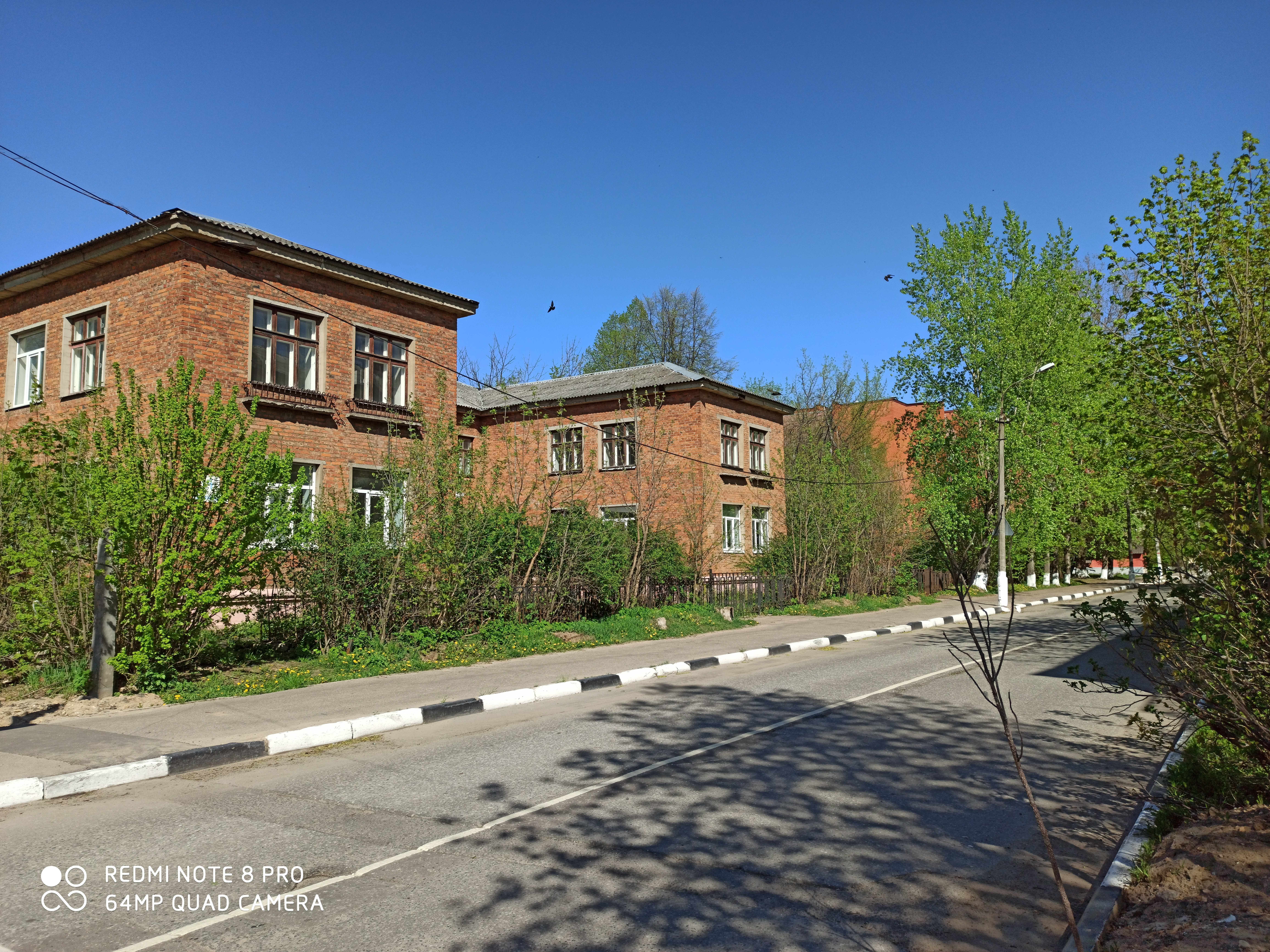 Вид на фасад бывшего здания музыкальной школы во Фрязино, Спортивный проезд 4, май 2020 года